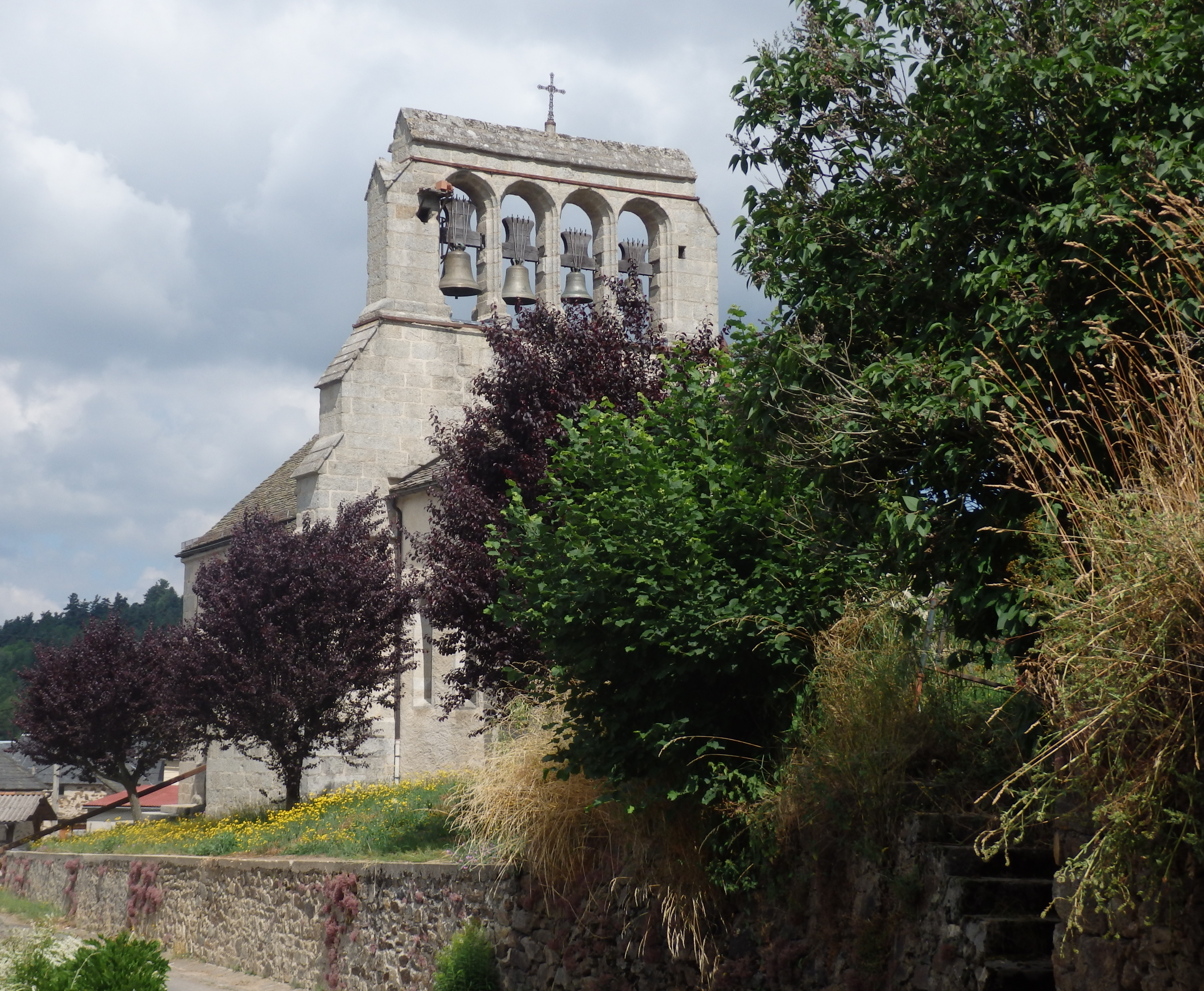 Église Saint-Sébastien